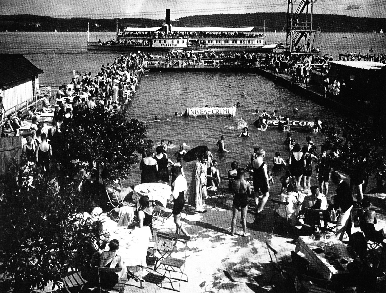 Starnberg, Undosa. Badebetrieb im Wellenbad um 1925.